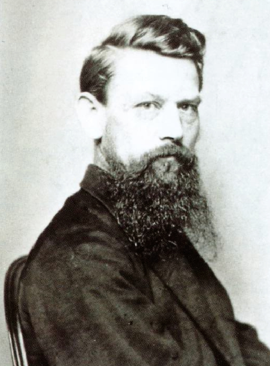 Adolf Werner (1827-1904): Porträt aus Festschrift 1000 Jahre Doberlug, 2005